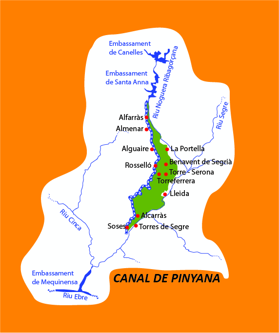 Municipis inclosos en el recorregut del Canal de Pinyana